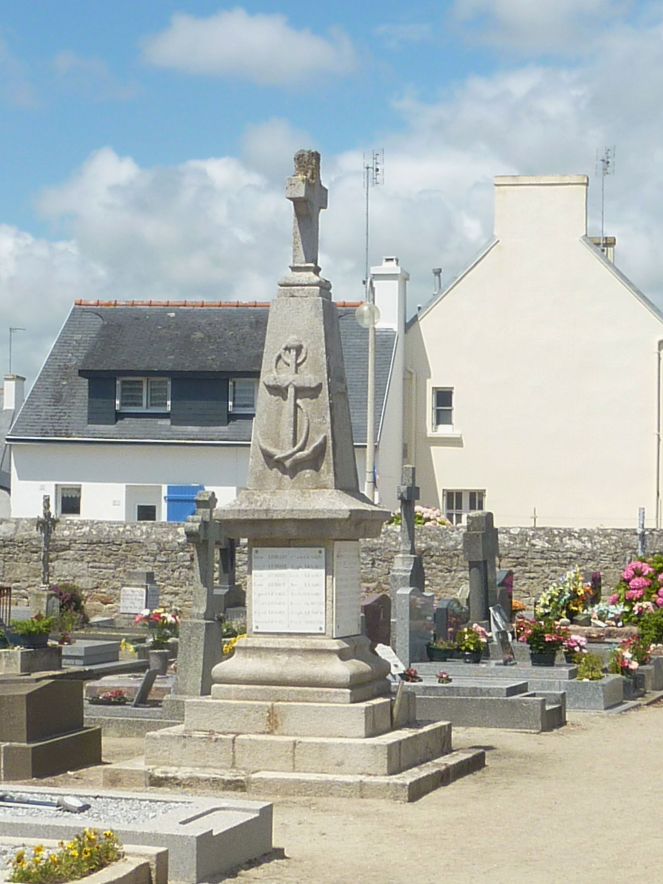 Île-Tudy : le monument aux morts (situé dans le cimetière)